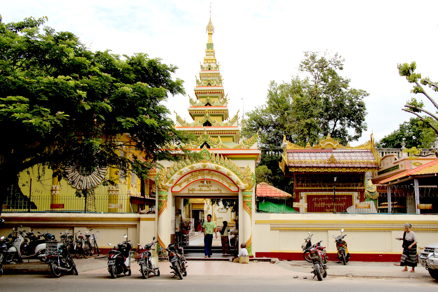 မြန်မာဘာသာ: ရွှေကျီးမြင်ဘုရားတောင်ဘက်မုဒ် (မန္တလေး)